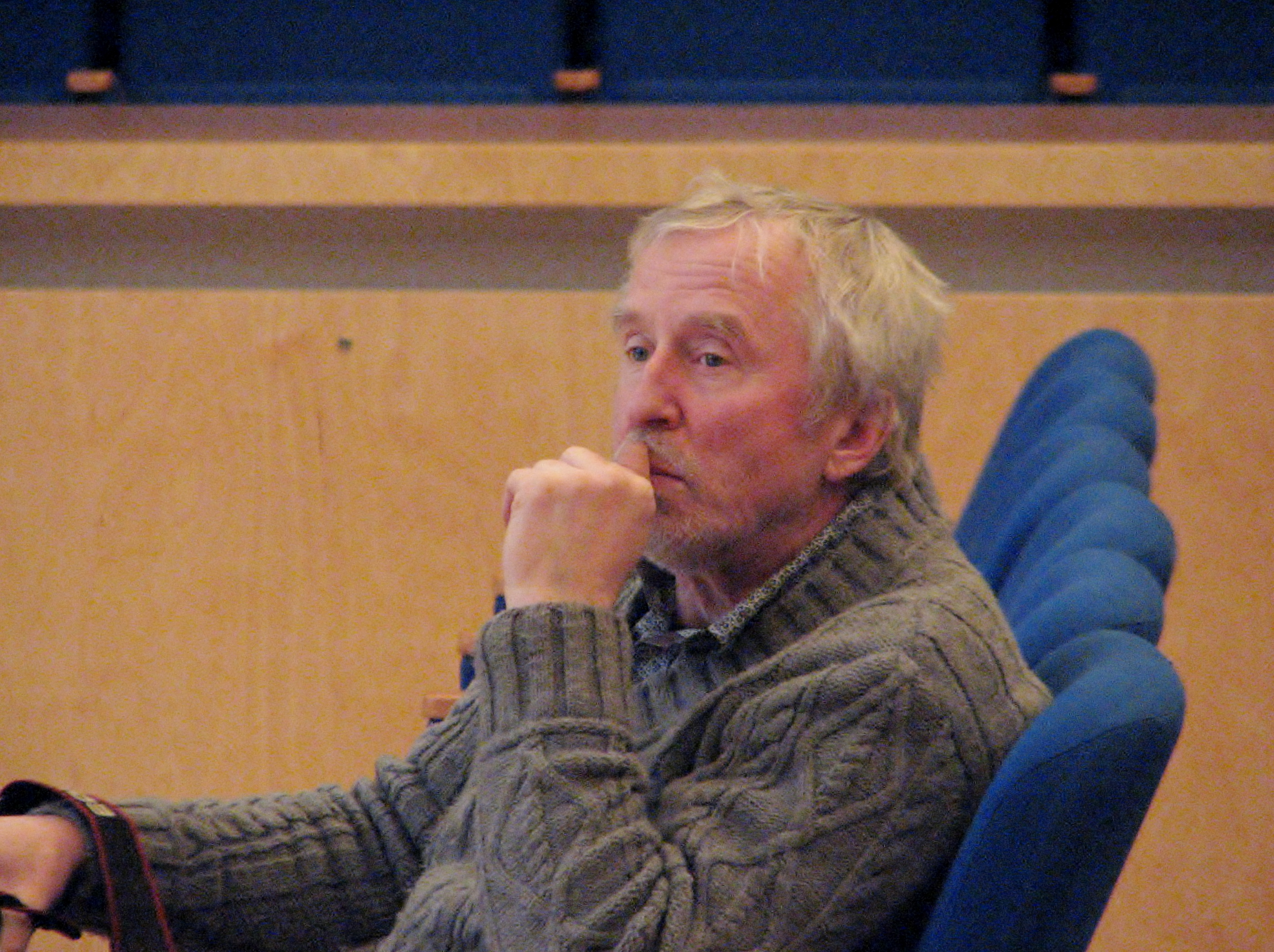 Teet Malsroos Eesti Rahvusraamatukogus konkursi 25 kauneimat Eesti raamatut ja 5 kauneimat lasteraamatut 2013 autasustamisel